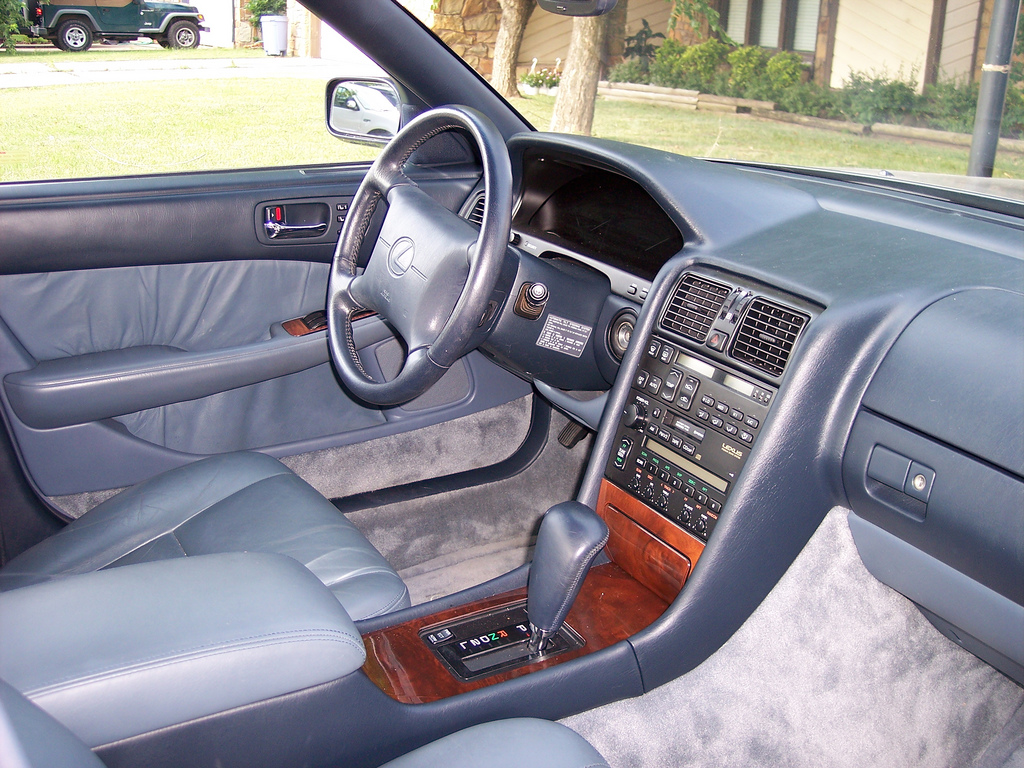 LS400